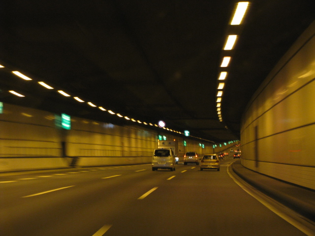 2009年8月11日、湾岸線西行き方面川崎航路トンネル内で撮影